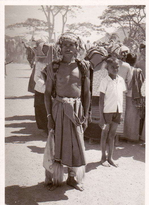 Um dançarino que executava a "dança do lenço"( o lenço está na mão direita)